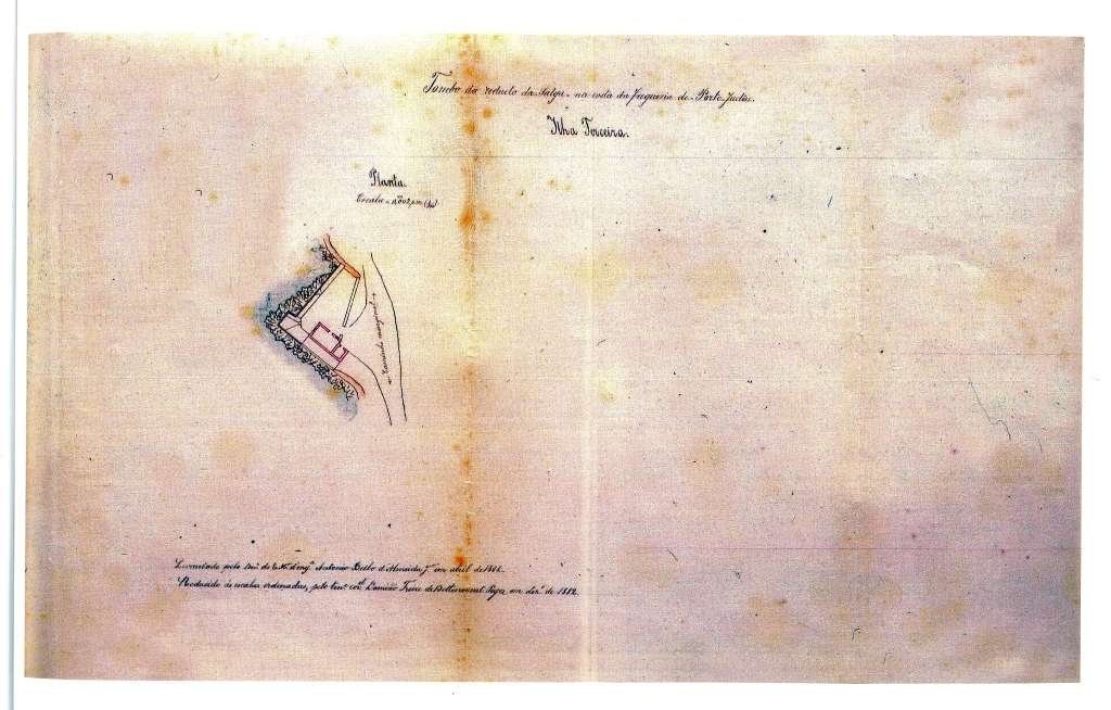 "Tombo do reducto da Salga na costa da freguezia de Porto Judeu", Ilha Terceira (Açores), Portugal.